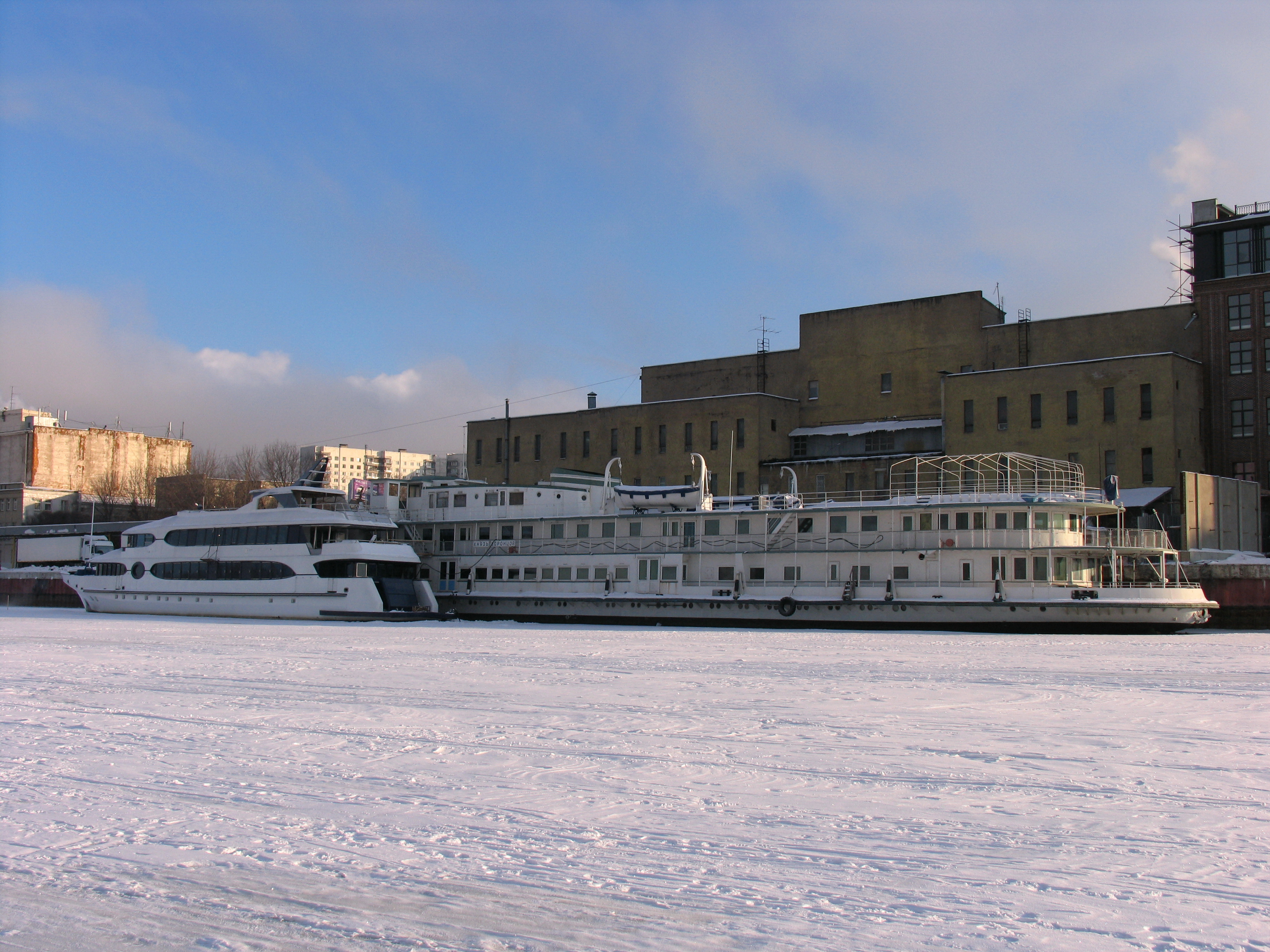 Теплоход "Князь Воронцов" (Киевская Русь, Эстония) и яхта "Балу" на зимовке в Северном речном порту.